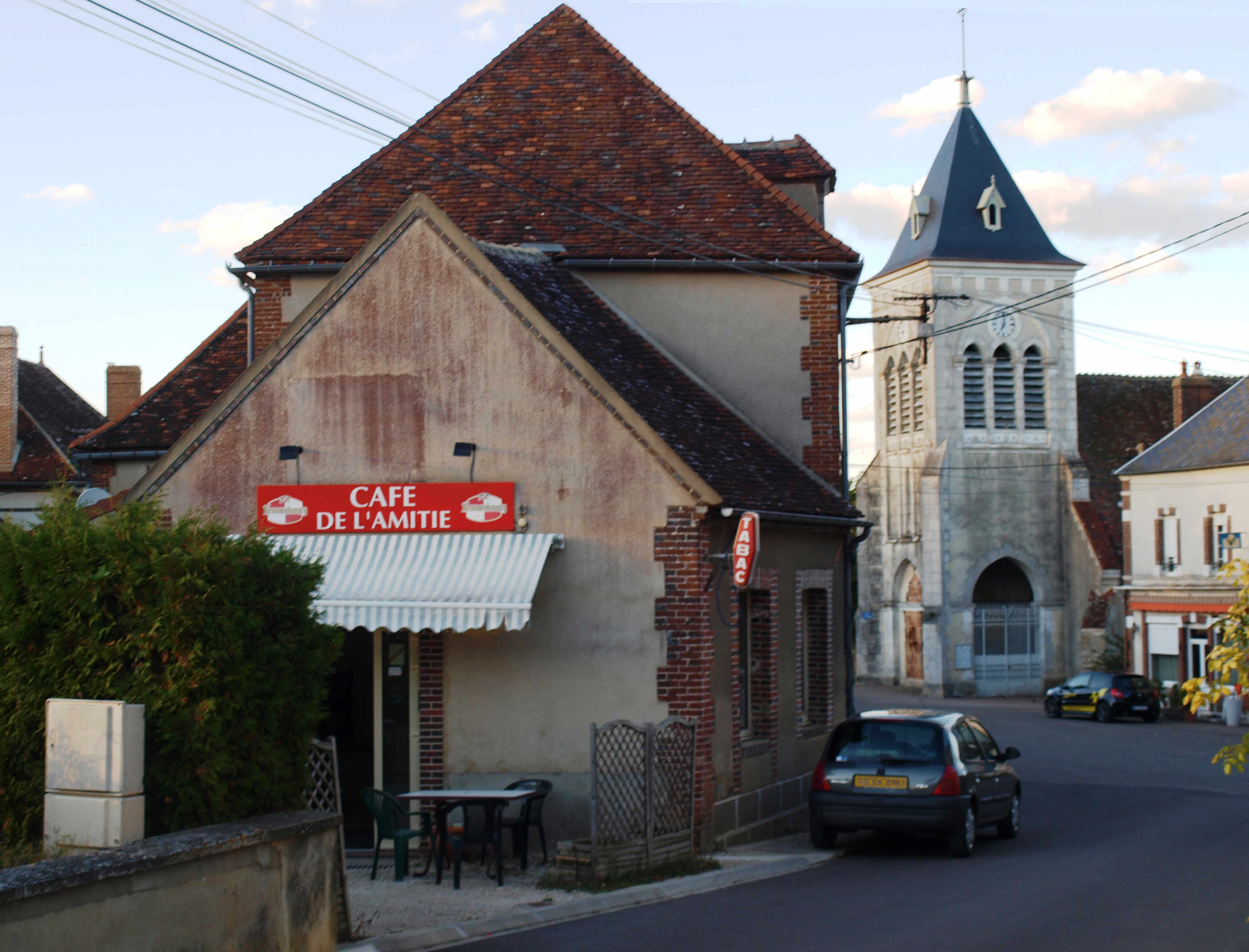 Saint-Aubin-Château-Neuf (Yonne, France) ; le bar-tabac.